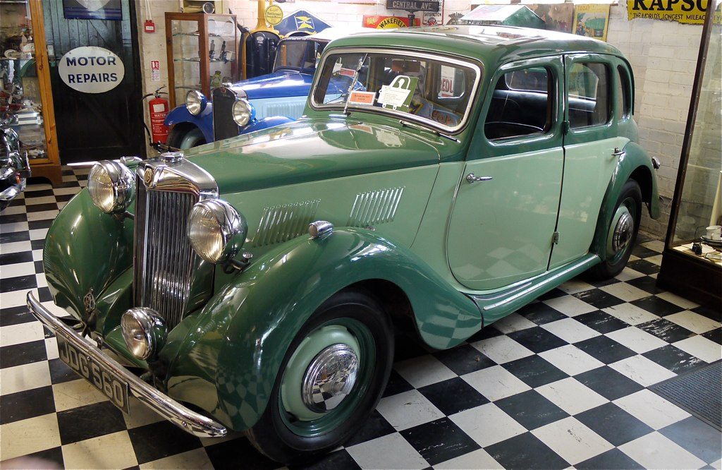 Panasonic G1 14-45 Lens